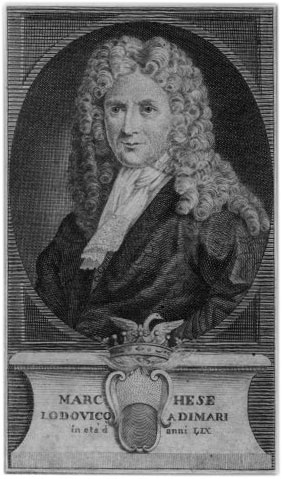 Il marchese Ludovico Adimari (1644-1708), poeta.